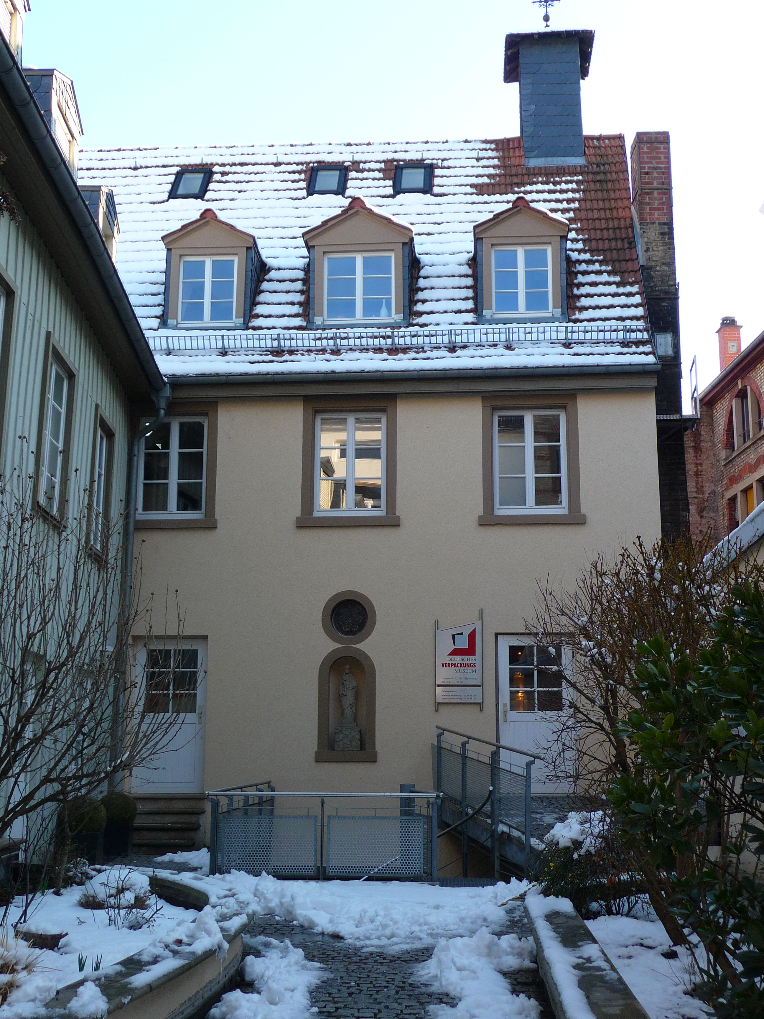 Deutsches Verpackungsmuseum in der Altstadt von Heidelberg (Baden-Württemberg, Deutschland)